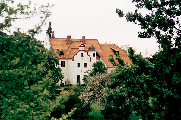 Haus Rath in Krefeld-Elfrath This image shows a heritage building in Germany, located in the North Rhine-Westphalian city Krefeld (no. 180).